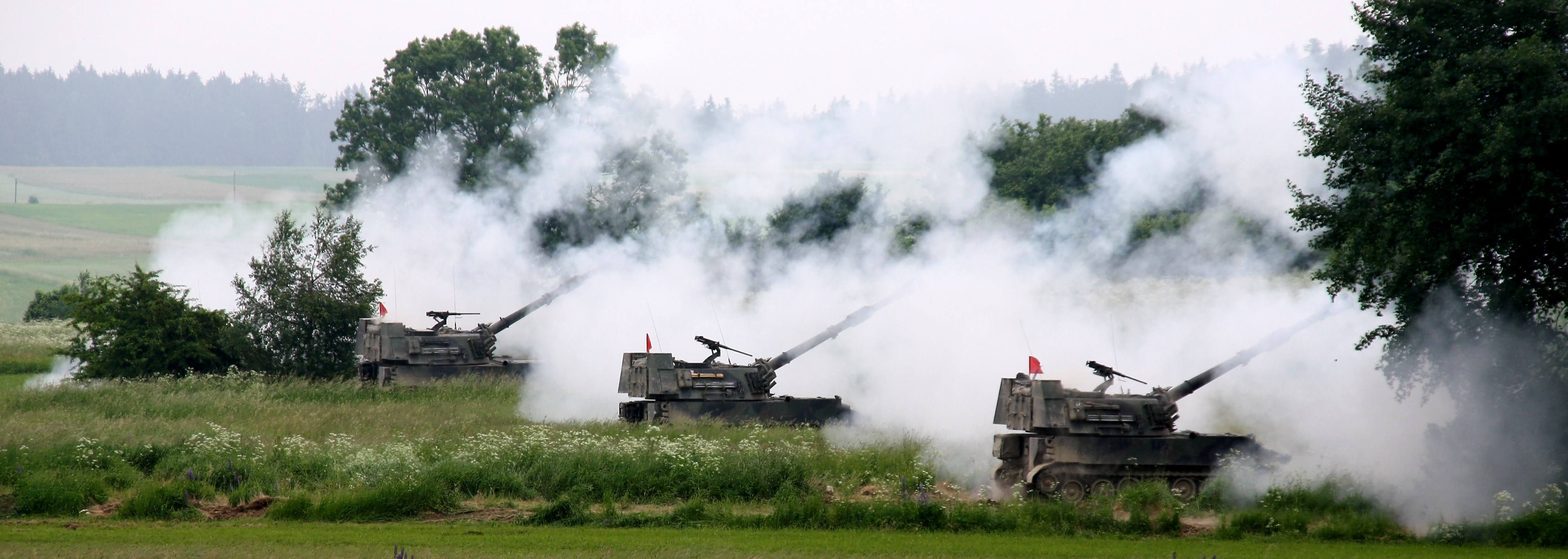 Panzerhaubitzen M-109 A5Ö in der Feuerstellung.